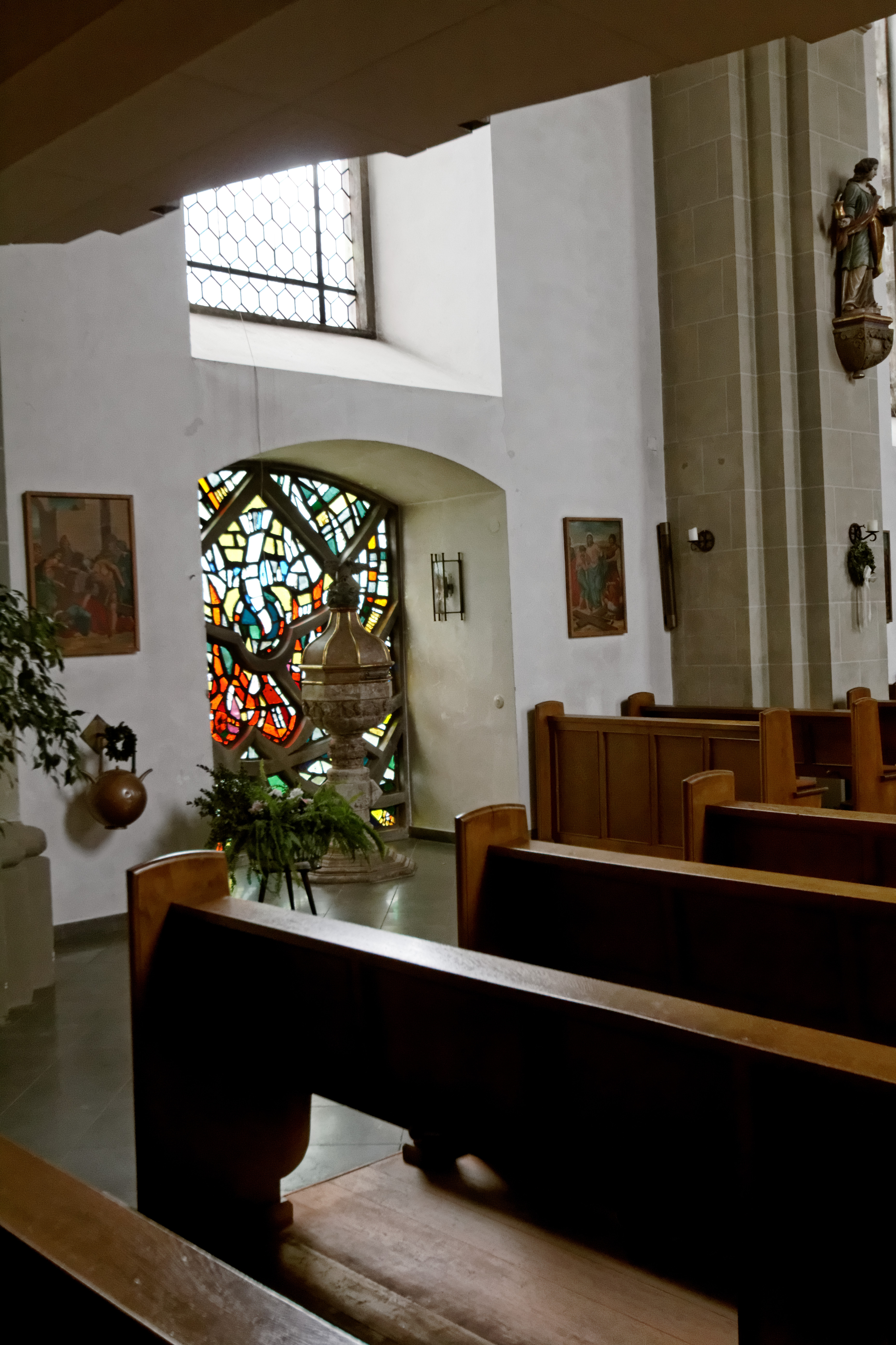 Warstein-Belecke, St. Pankratiuskirche Innenansicht Seitenfenster